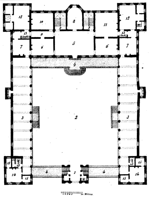 grondplan kasteel van Ronse uit het boek "Historisch onderzoek naar de STAD RONSE" uit 1856 van Gustave en Leonard BATTAILLE Gent, drukkerij Vander Schelden Weduwe en zoon